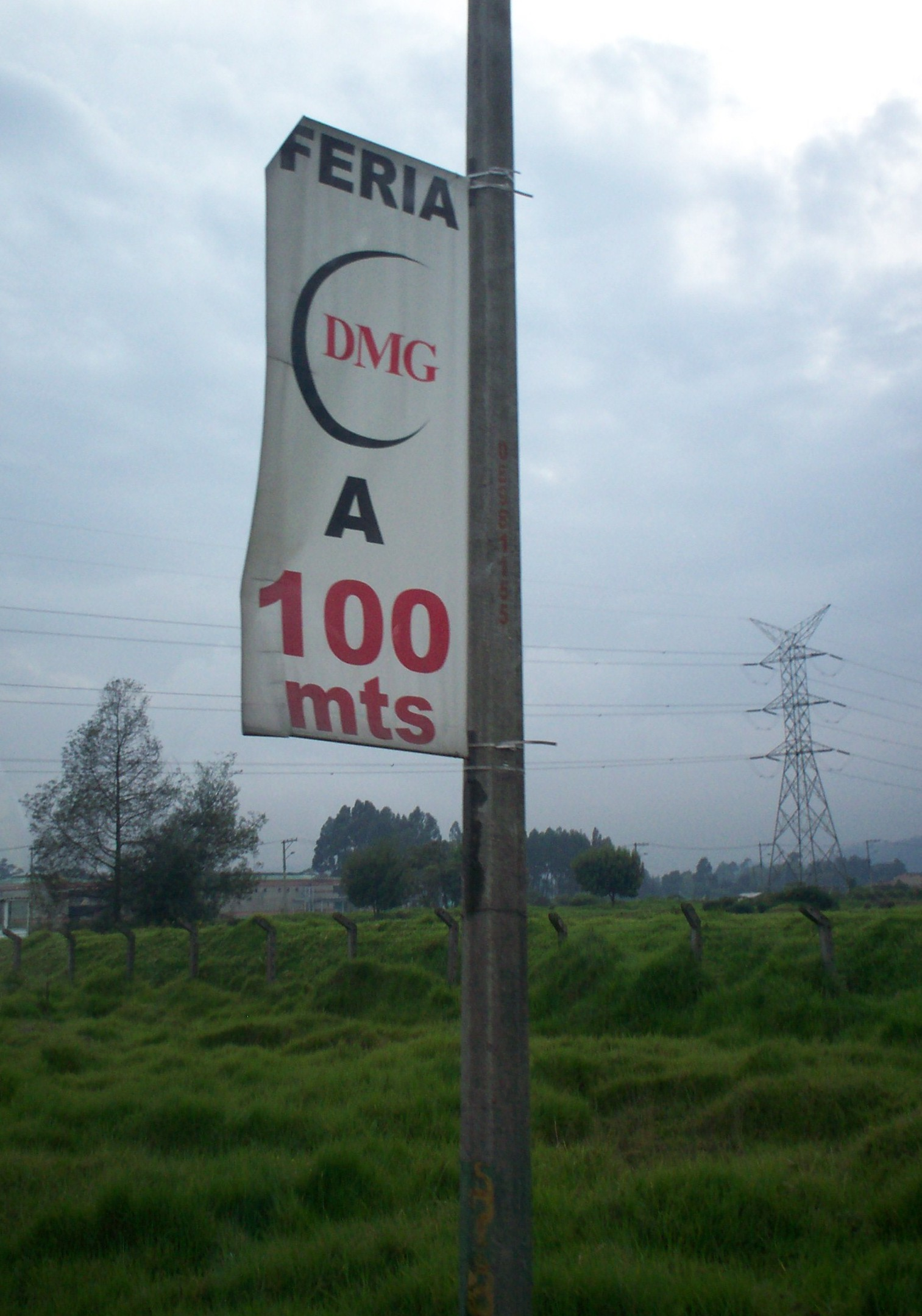 Pancarta en cercanías a la feria DMG de la Autopista Norte en Bogotá.